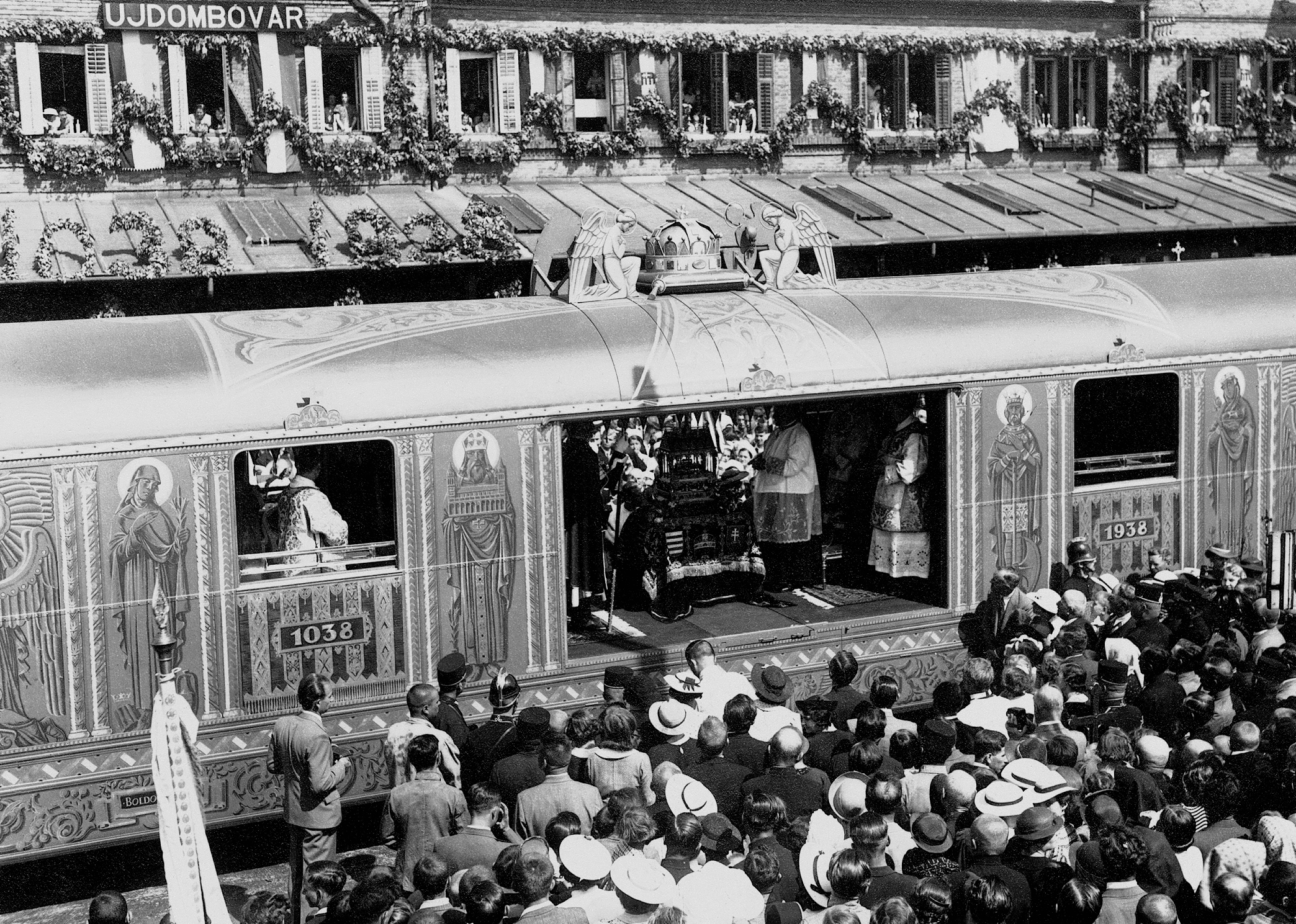 Újdombóvár (ekkor önálló), a Szent Jobbot szállító különvonat az állomáson. Location: Hungary, Dombóvár Tags: railway, mass, festive, Hungarian Railways, crown, relic Title: Újdombóvár (ekkor önálló), a Szent Jobbot szállító különvonat az állomáson.